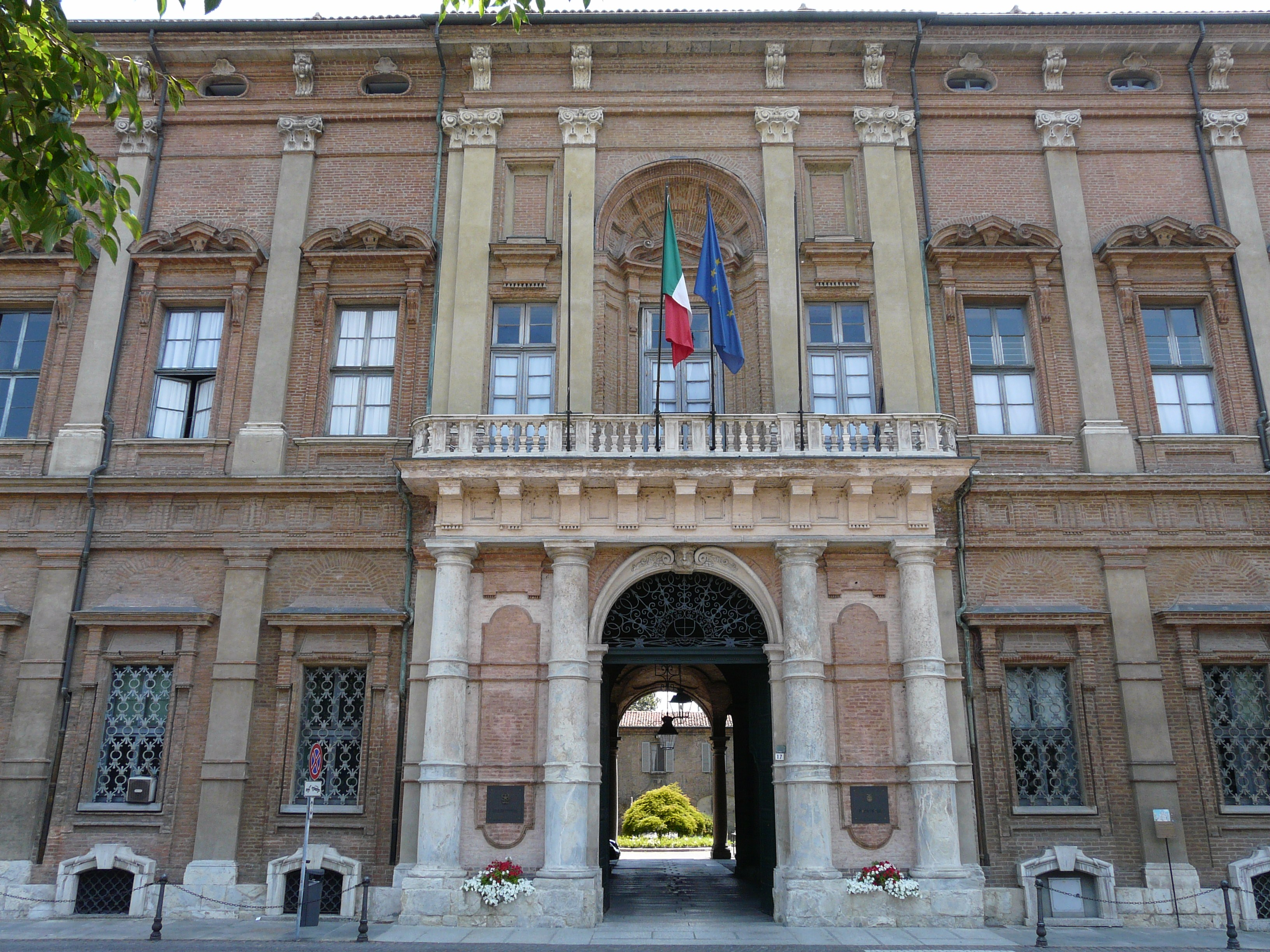 Palazzo Ghilini, sede della Prefettura e della Provincia, Alessandria, Piemonte, Italia